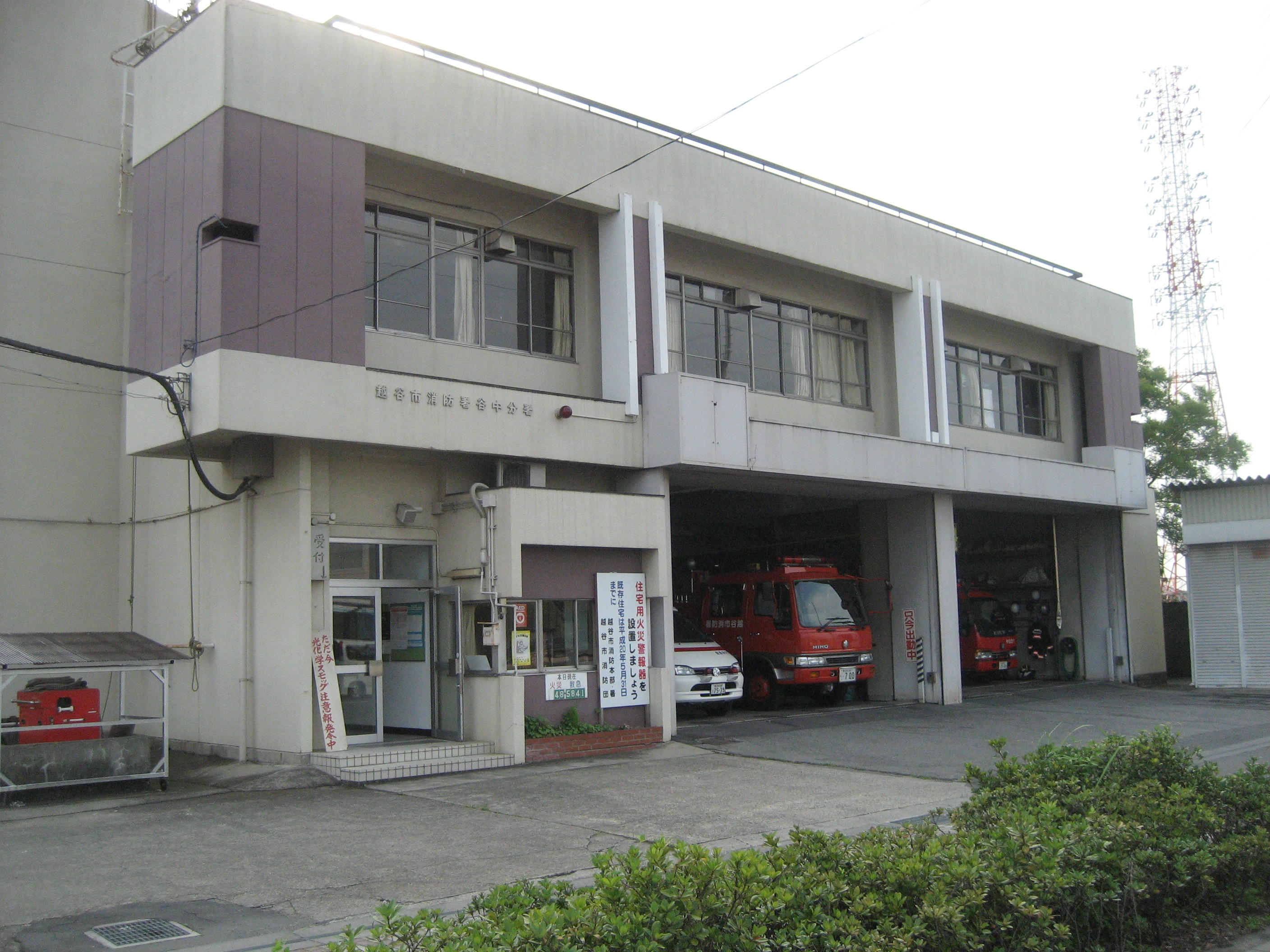 越谷市消防本部谷中分署